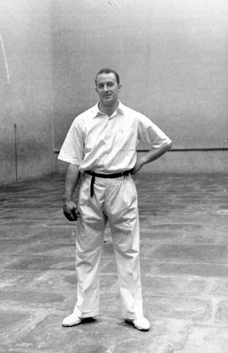 The pelotari Akarregi in 1952